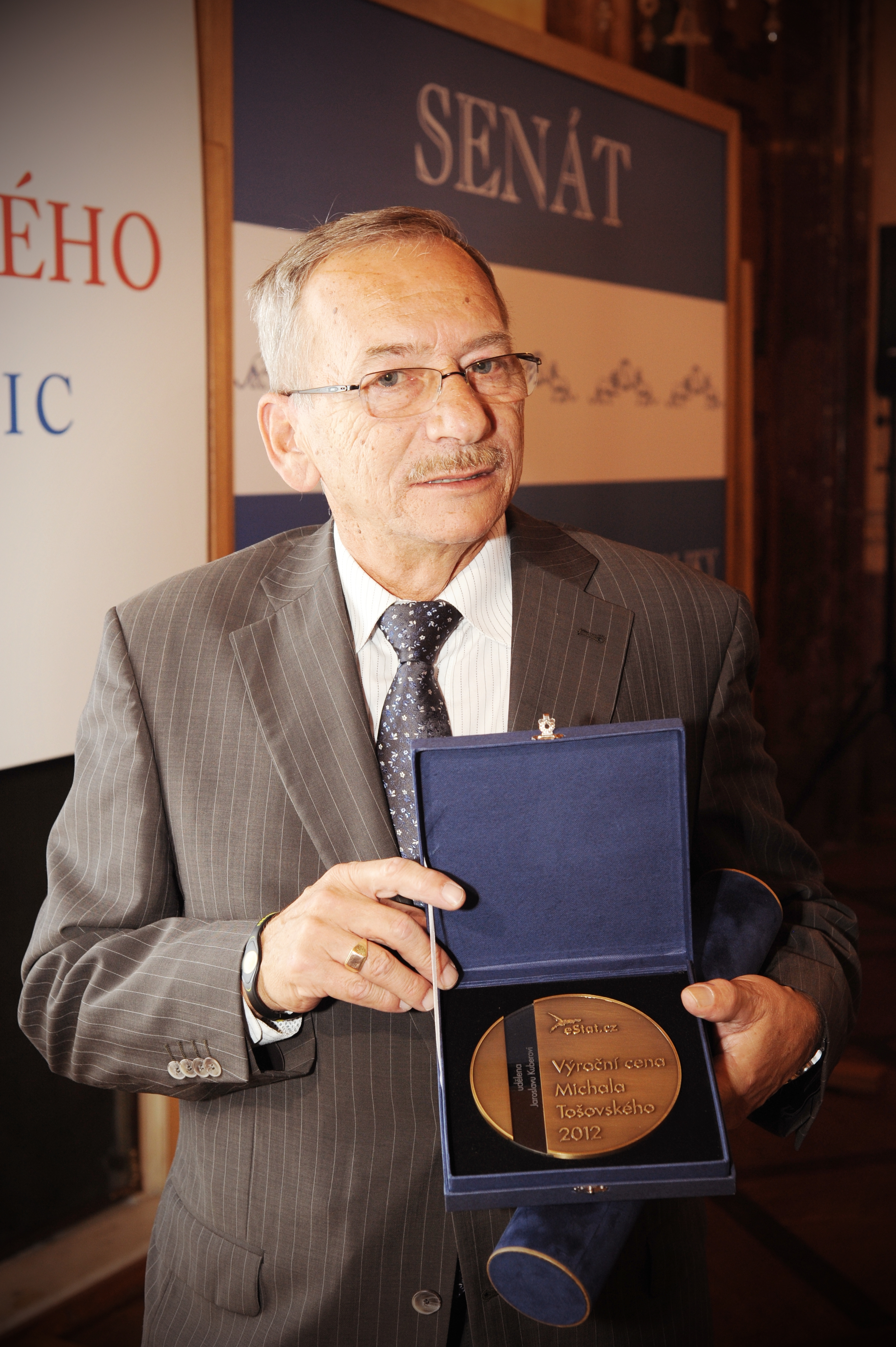 Antibyrokratickou cenu získal roku 2012 Teplický primátor a senátor ODS Jaroslav Kubera. Tato fotografie zobrazuje Kuberu a jeho cenu.